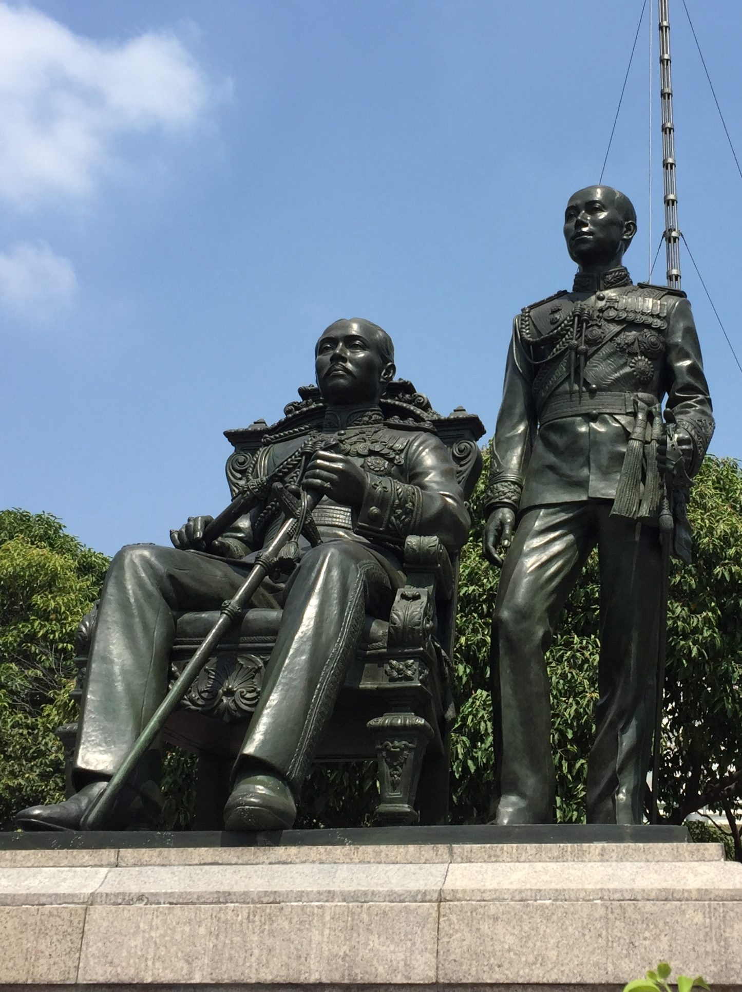 พระบรมราชานุสาวรีย์สมเด็จพระปิยมหาราชและสมเด็จพระมหาธีรราชเจ้า ภาพระยะใกล้